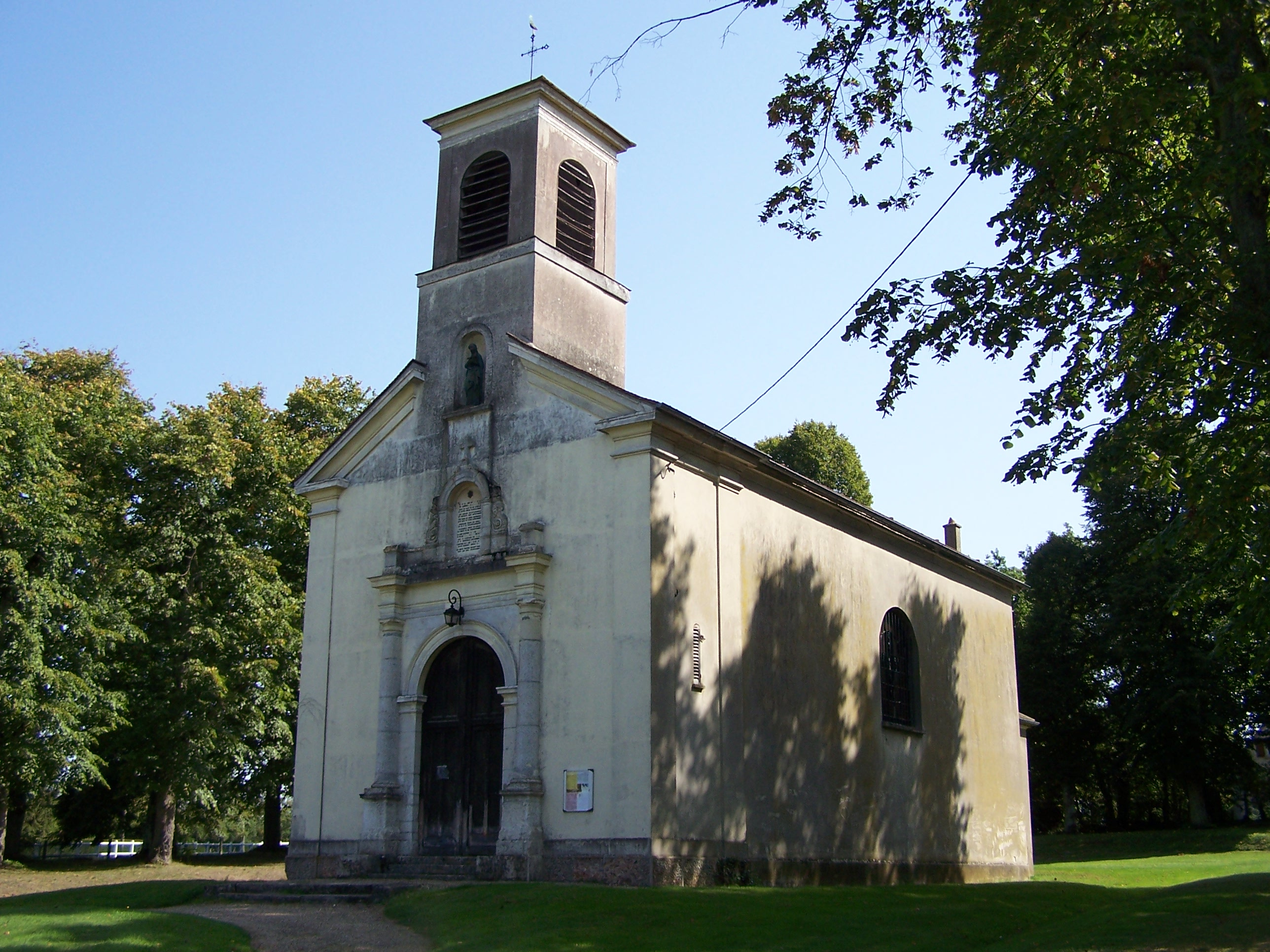 Église Saint-Martin et Saint-Maurice de Millemont (Yvelines, France)